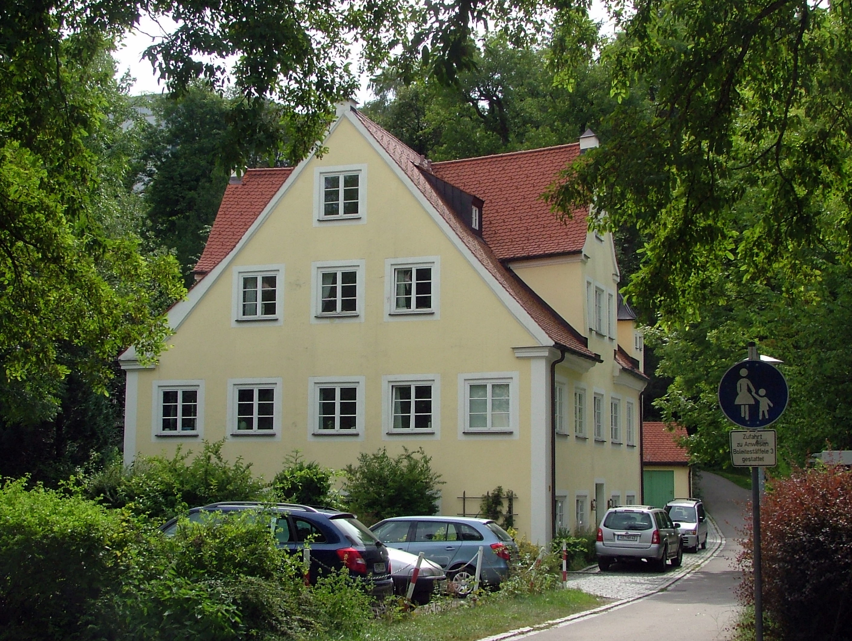 Boleite 3